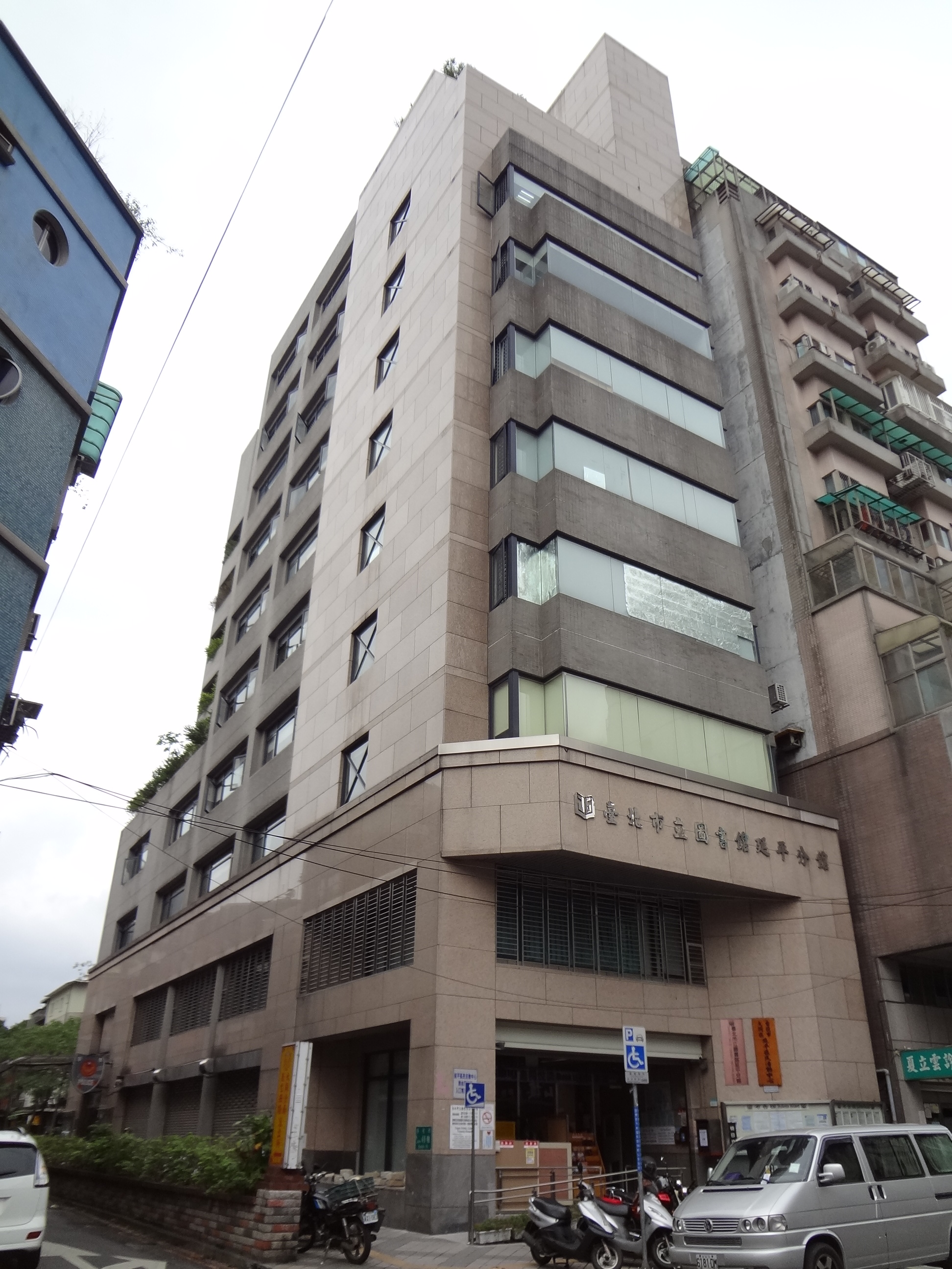 臺北市立圖書館延平分館，位於臺北市大同區保安街47號。